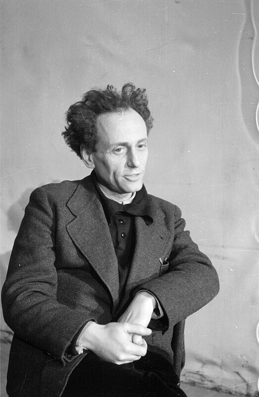 Original image description from the Deutsche Fotothek Porträt